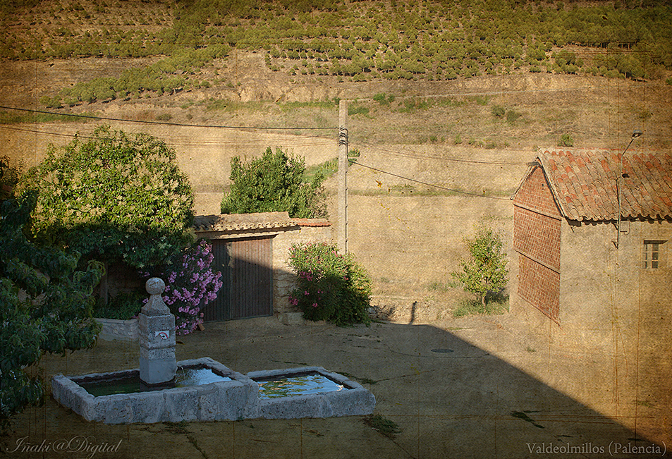 Rincon de Valdeolmillos "Fuente de los Caños"